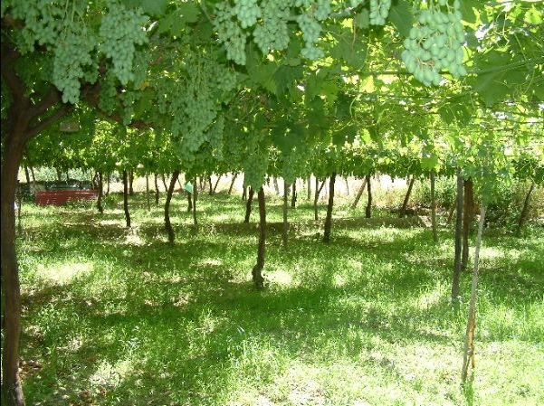 Parrales canjilones